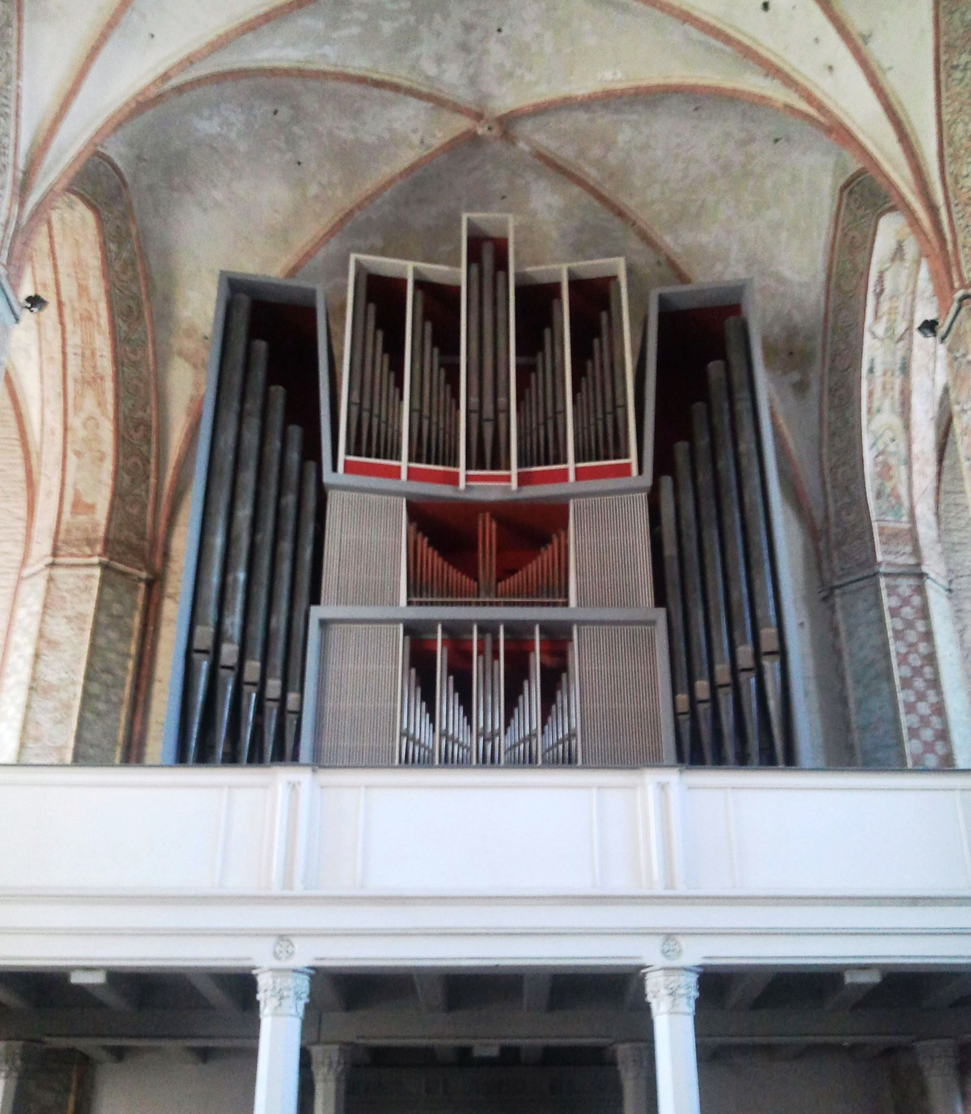 Orgel der Marienkirche in Anklam.